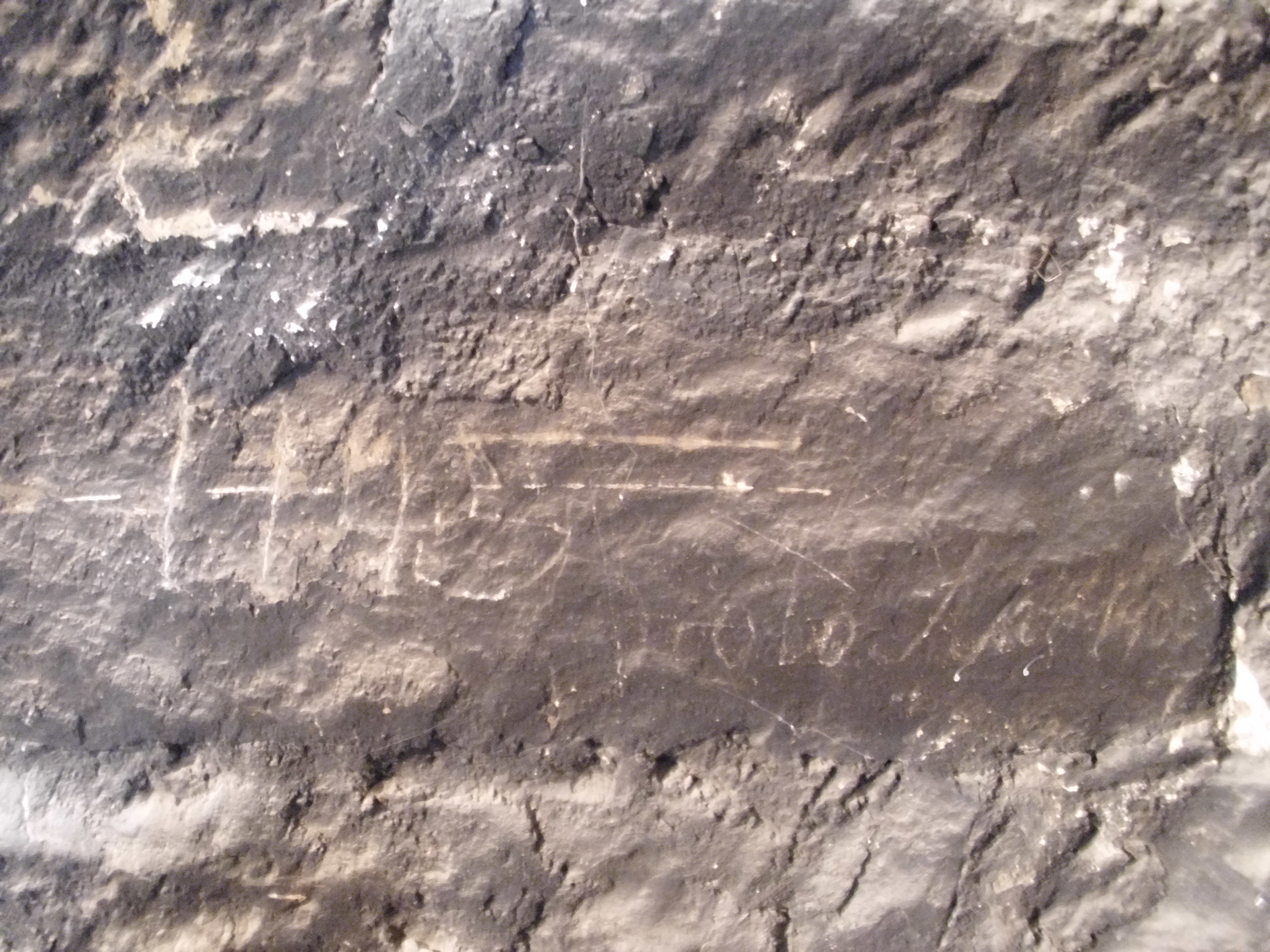 Inscripción grabada sobre un muro de la cárcel de Broto.